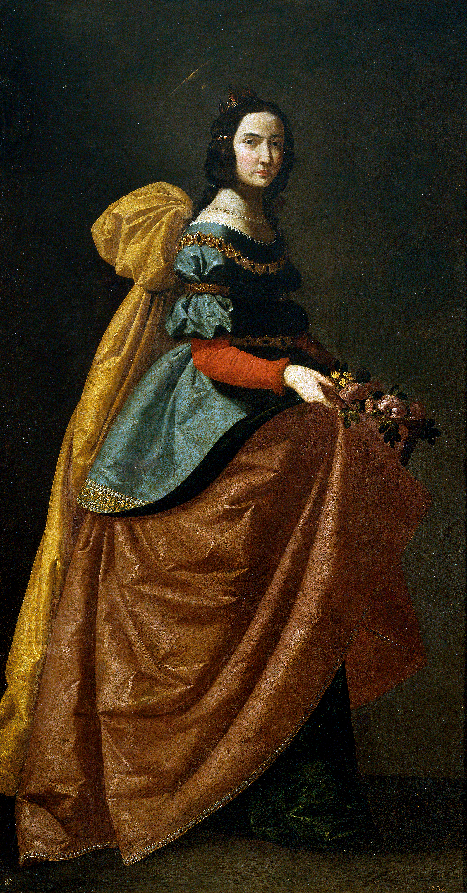 Francisco de Zurbarán, Santa Isabel de Portugal, óleo sobre lienzo, 184 x 98 cm. Museo del Prado